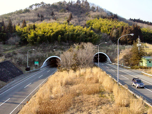 東北自動車道福島トンネル起点側坑口